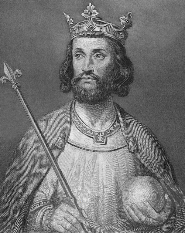 Eudes Ier de France, Odo of France